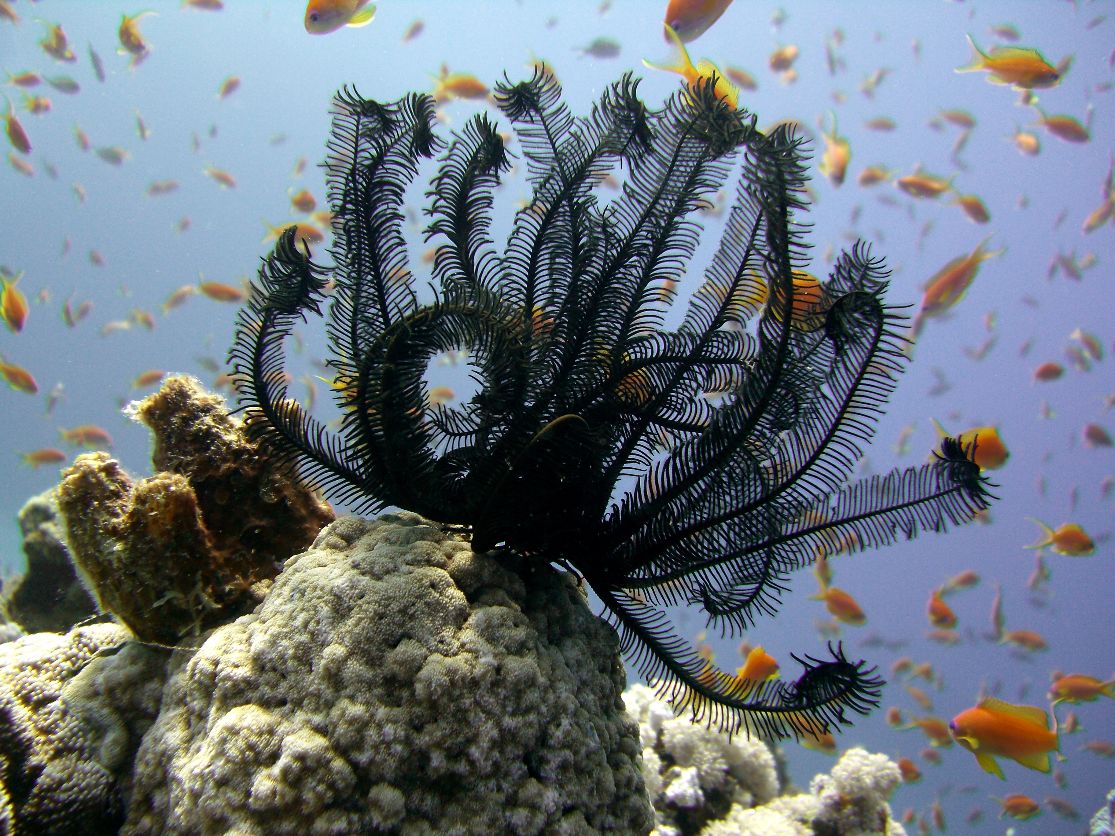 Comatulid crinoid (Comaster schlegelii)